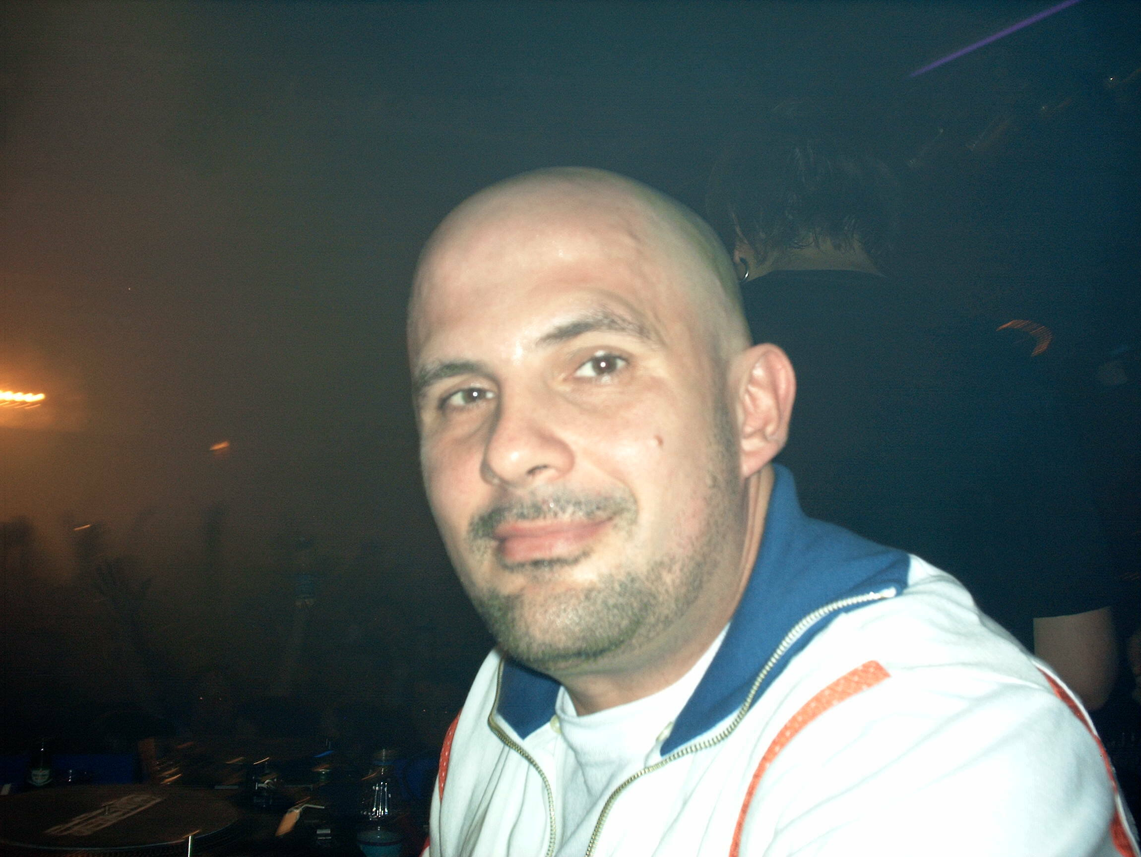 DJ WestBam lächelte vor seinem Auftritt in der KuFa Saarbrücken am 1. Oktober 2004 ganz nett in meine Kamera. Der Dateiname ist durch ein Missgeschick leider etwas anders. Gemeinfrei.